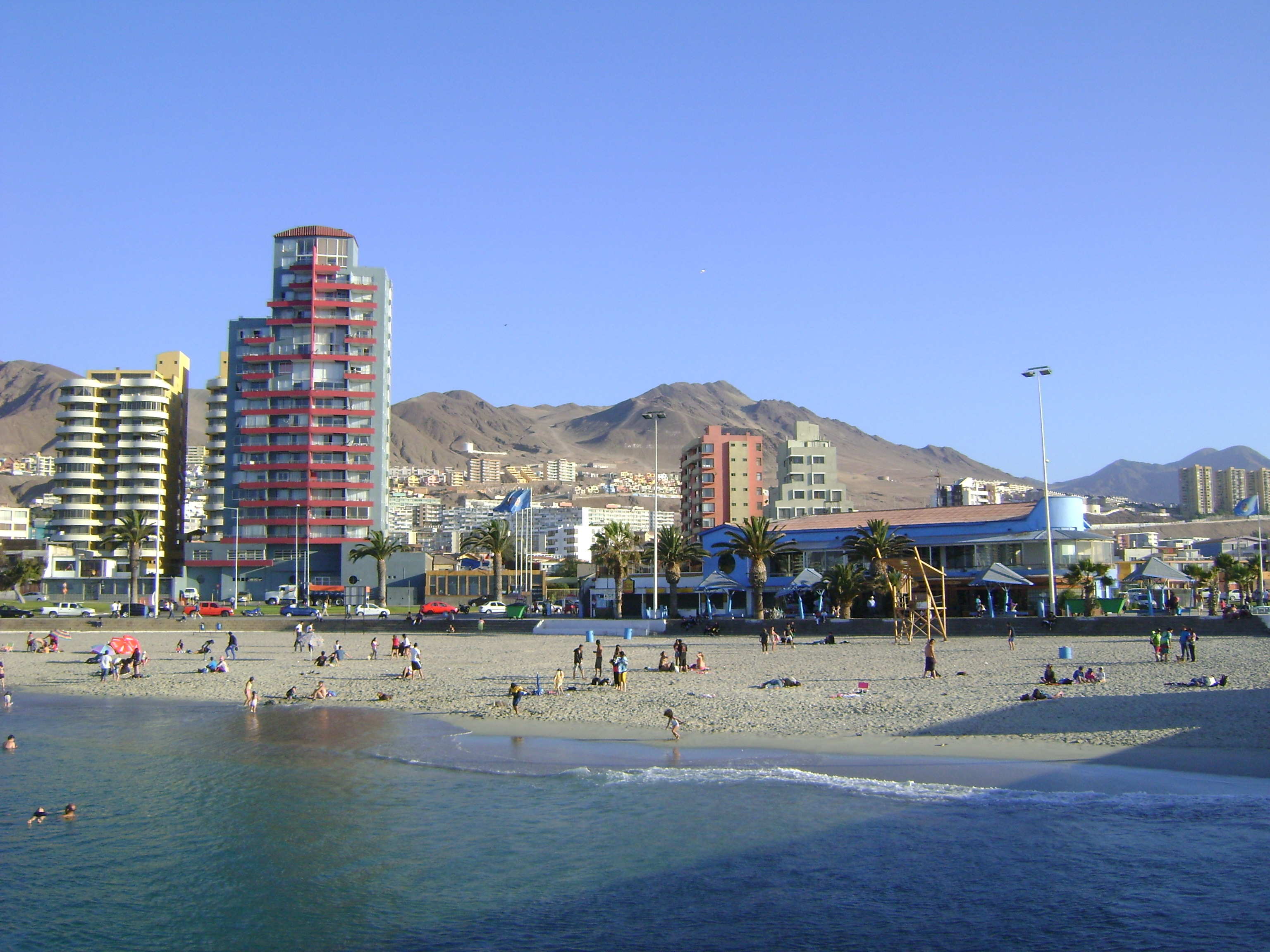 Vista del Balneario, con el Edificio de Servicios en el centro y, al fondo, los edificios Gran Océano (izquierda) y Normandía (derecha).